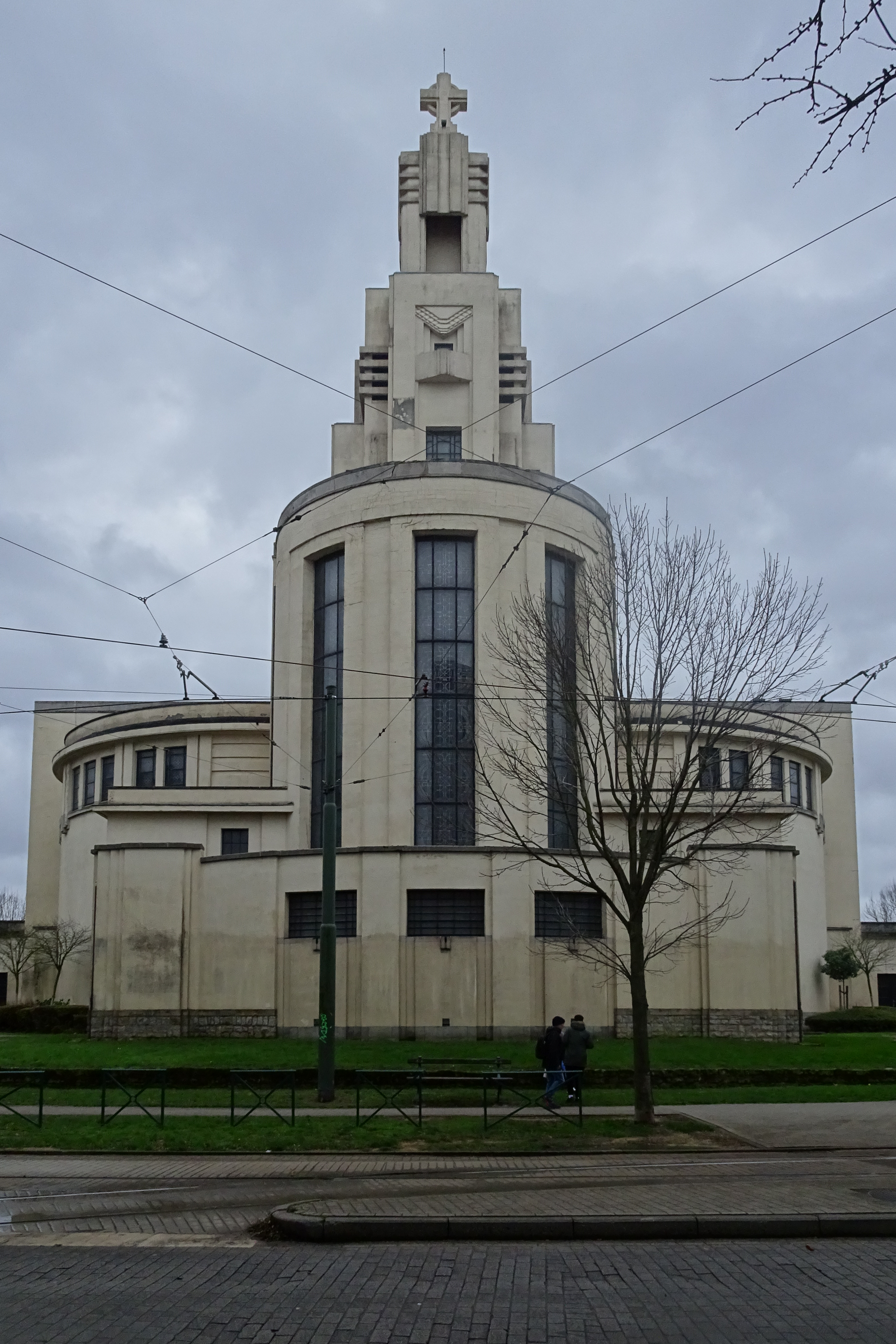 Eglise St. Augustin de l'altitude 100